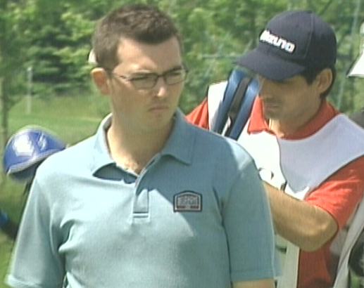 Bildbeschreibung: Adrien Mörk bei den Austrian Open 2006 Quelle: eigene Aufnahme mit einer Handycam Fotograf/Zeichner: Boss 11:22, 13 June 2006 (UTC) Datum: 10.6.2006 Sonstiges: GNU